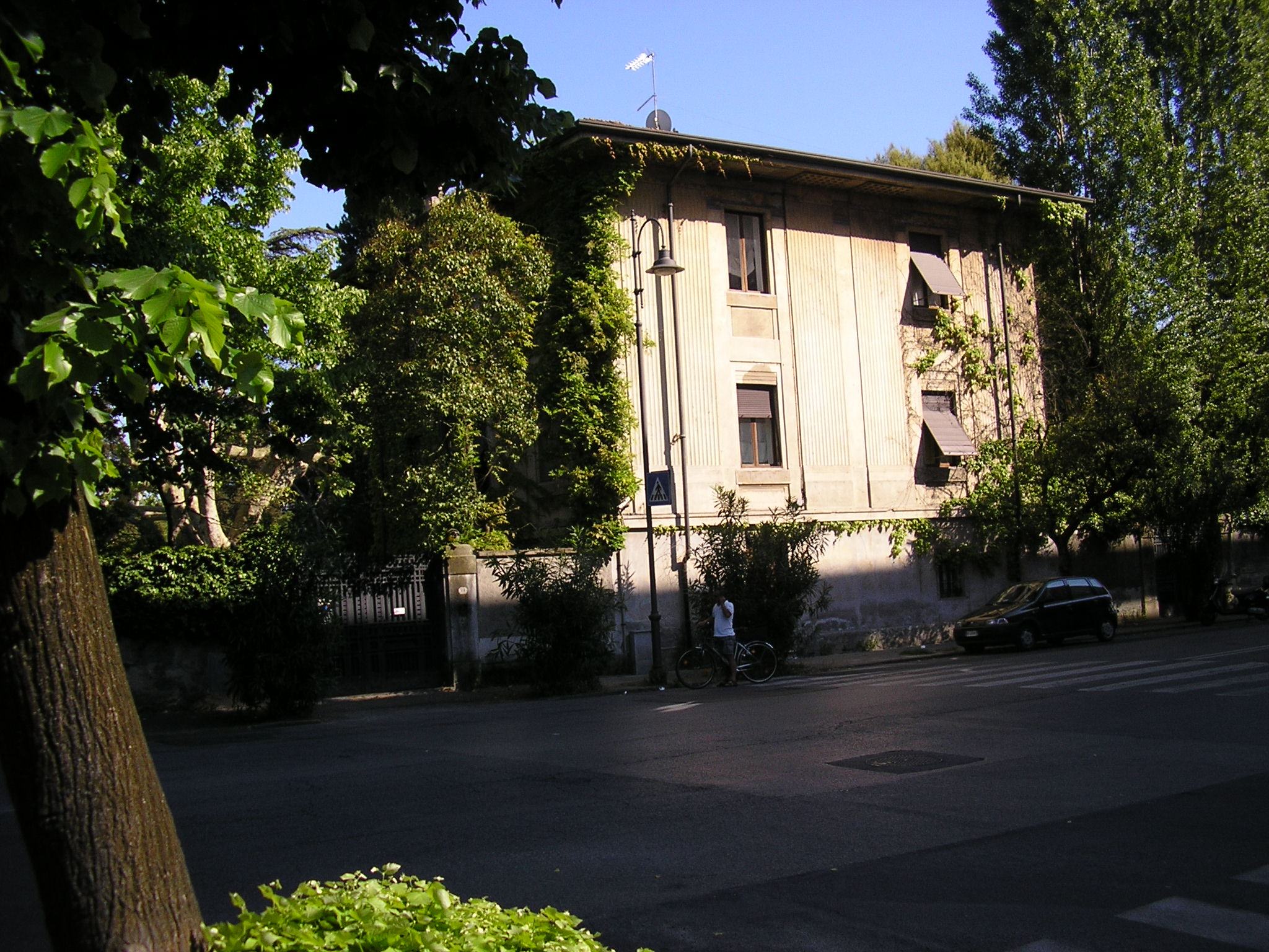 Marina di Carrara, Villa Giampaoli